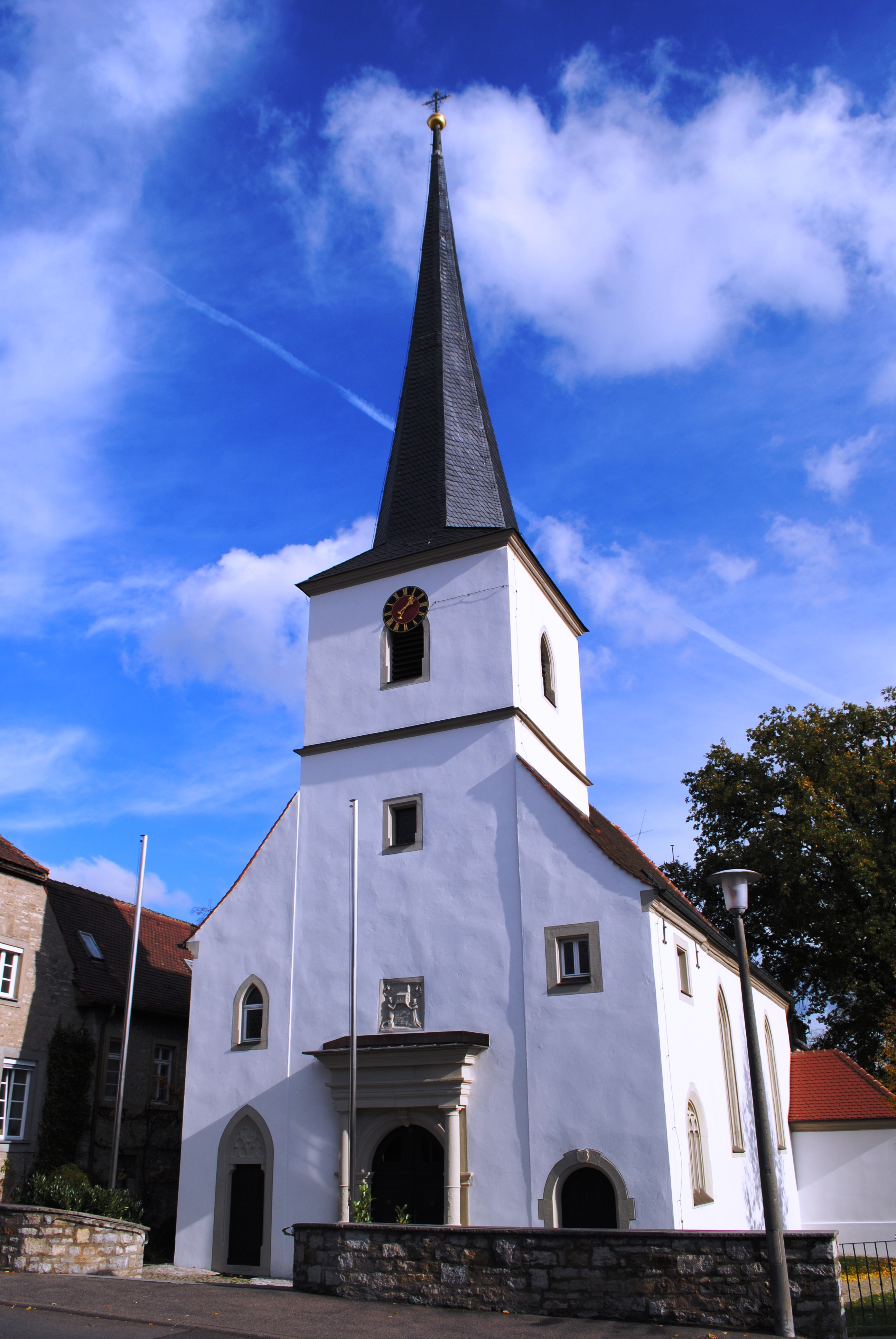 Kirche St. Laurentius, Stadtschwarzacher Straße 16, Schwarzach-Schwarzenau, Saalbau mit Polygonchor, 1592 von Valentin Echter von Mespelbrunn und seiner Frau gestiftet; mit Ausstattung; D-6-75-165-43